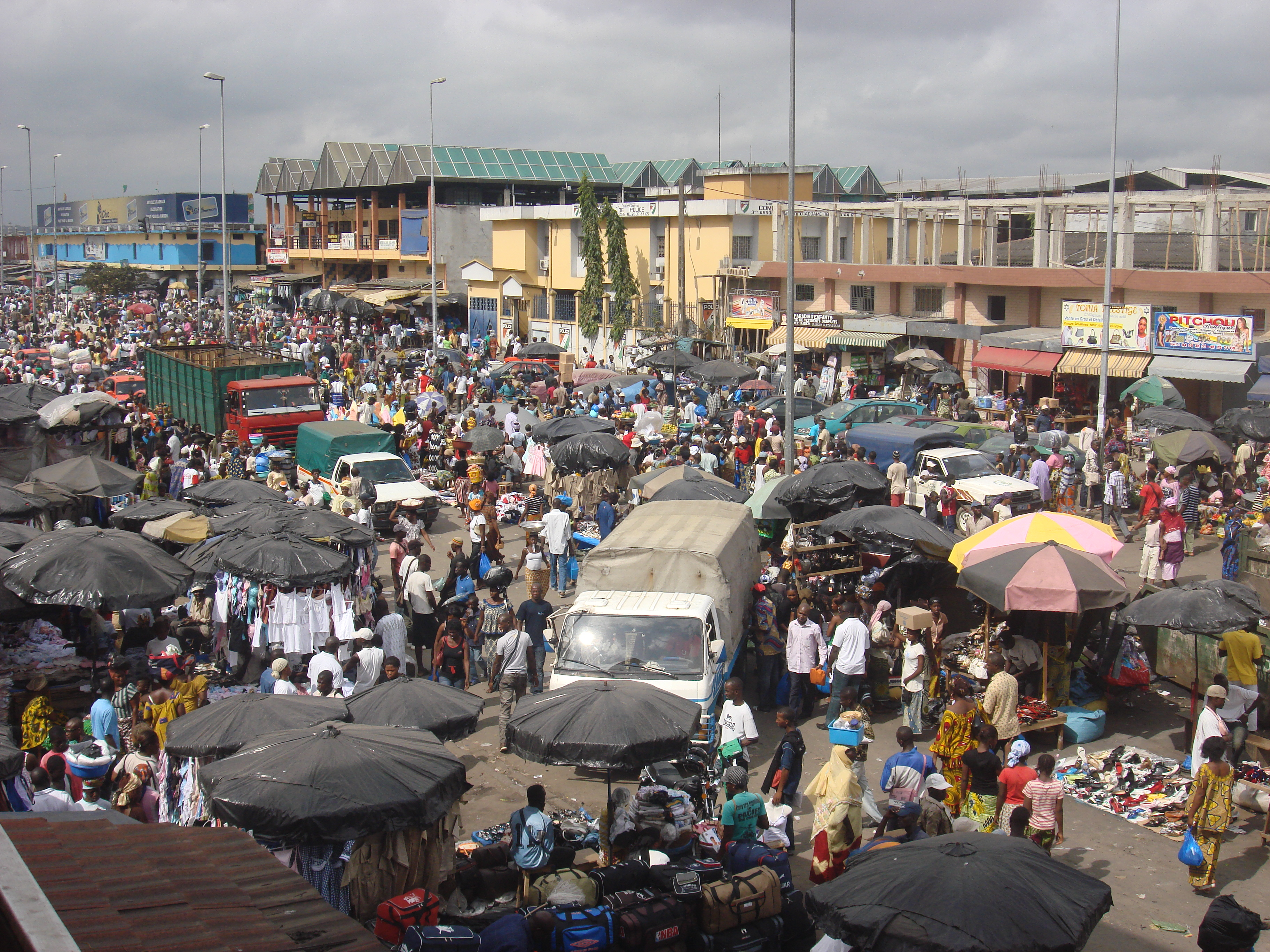 Marché traditionnel d'Adjamé à Abidjan, Côte d'Ivoire